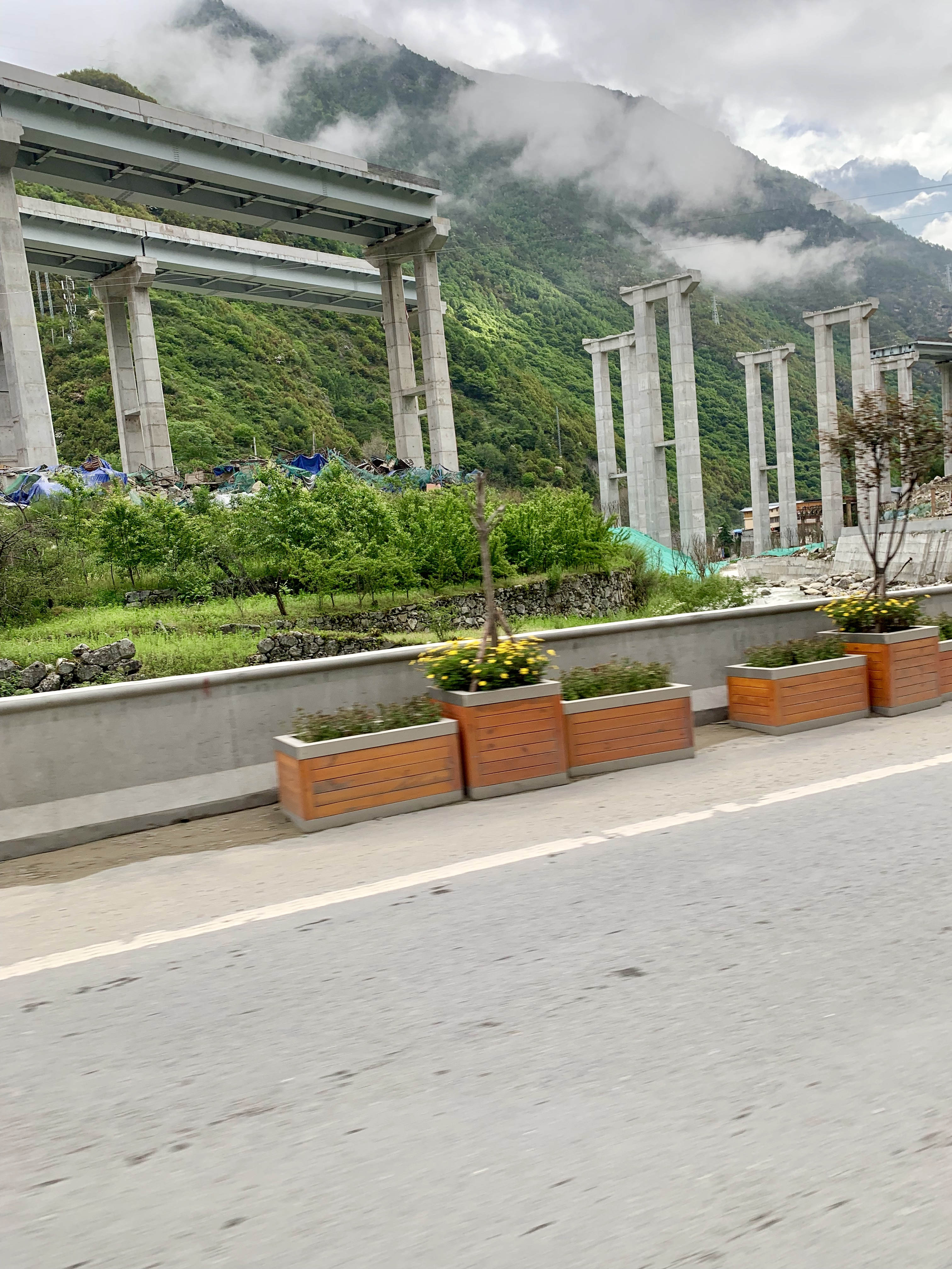 正在建设中的雅叶高速康定终点及康定-新都桥段